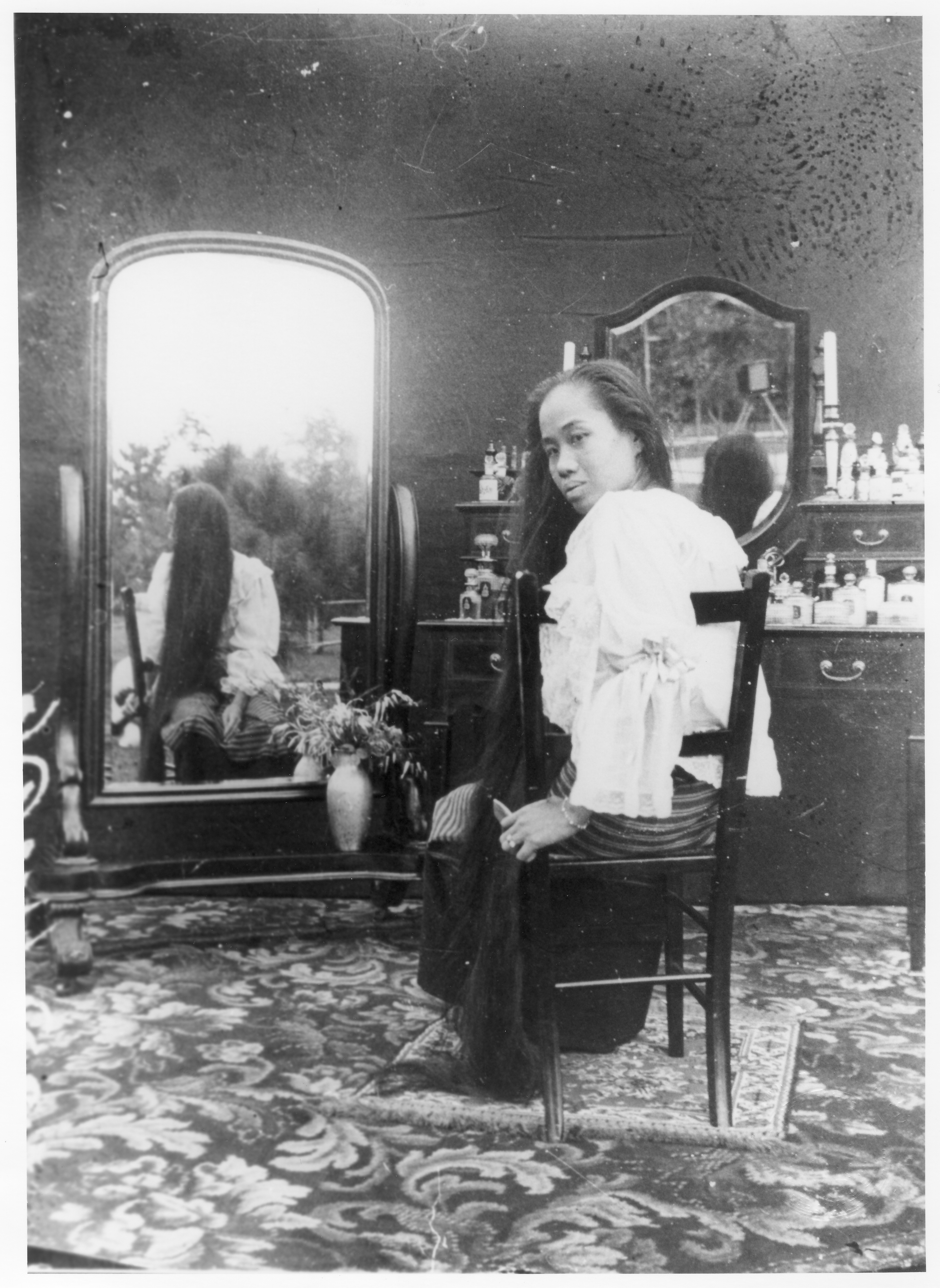 ผู้ถ่ายภาพ เอบ บุนนาก